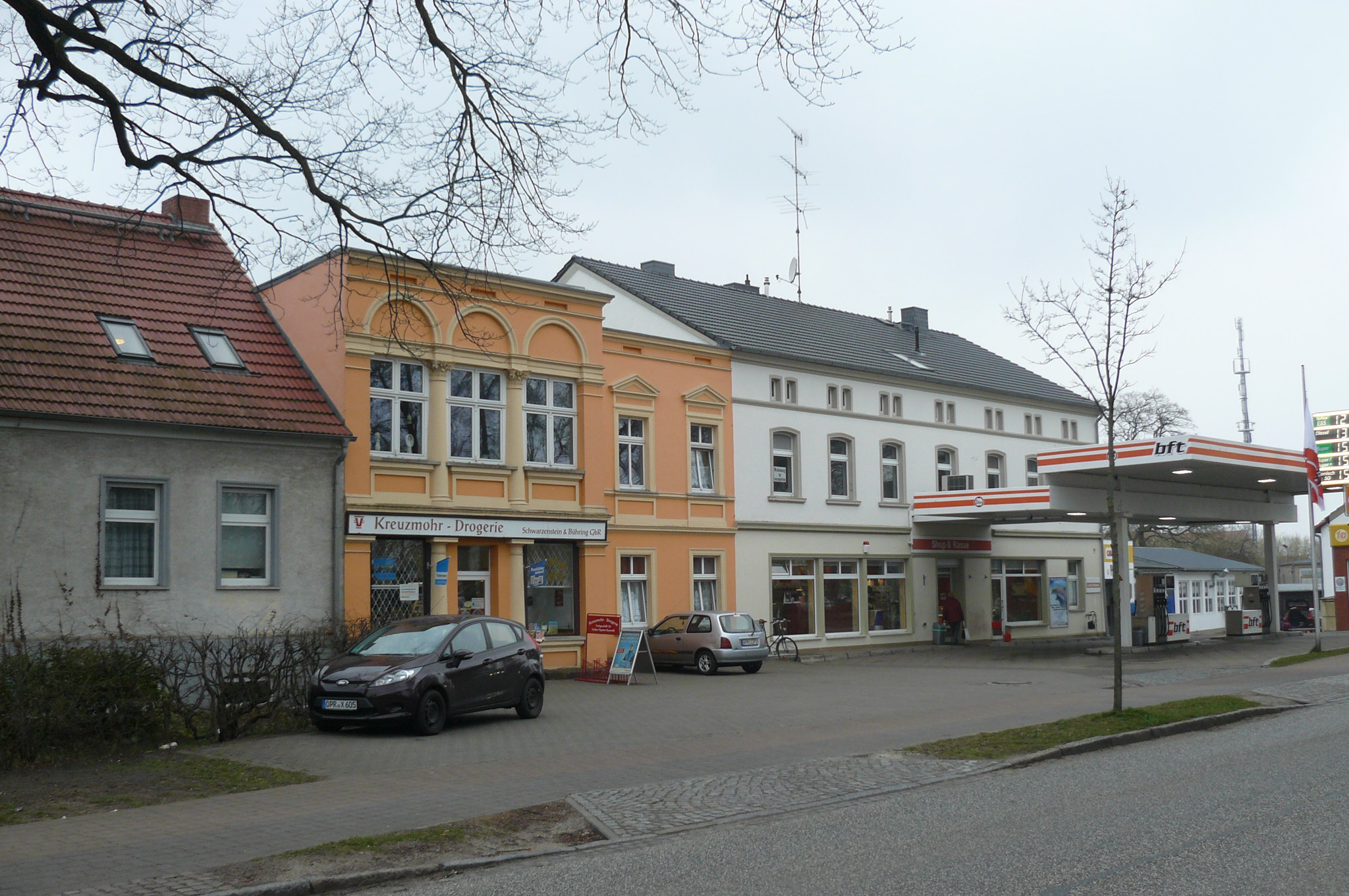 Neustadt (Dosse) city center.